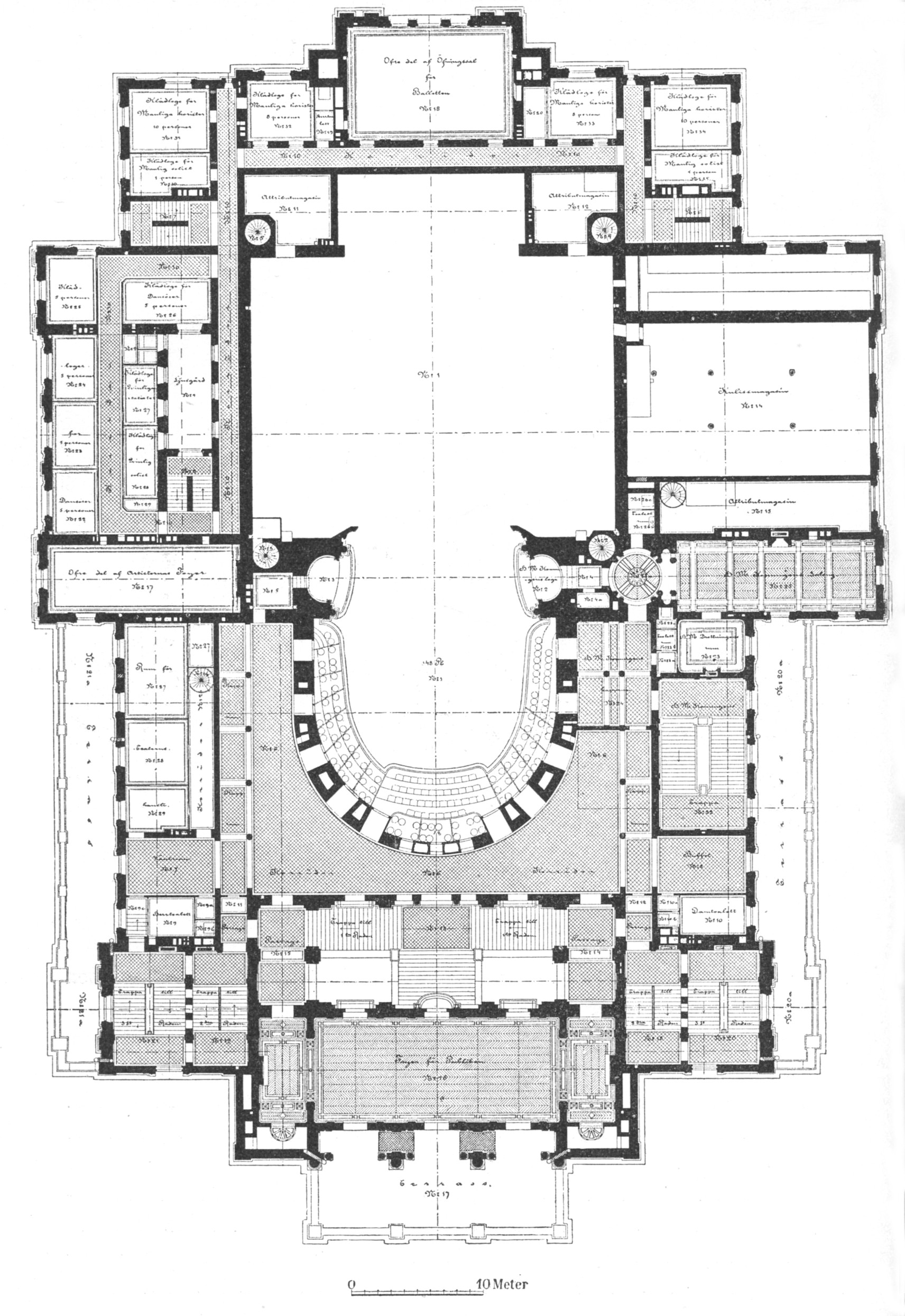 Kungliga Operan i Stockholm, planritning